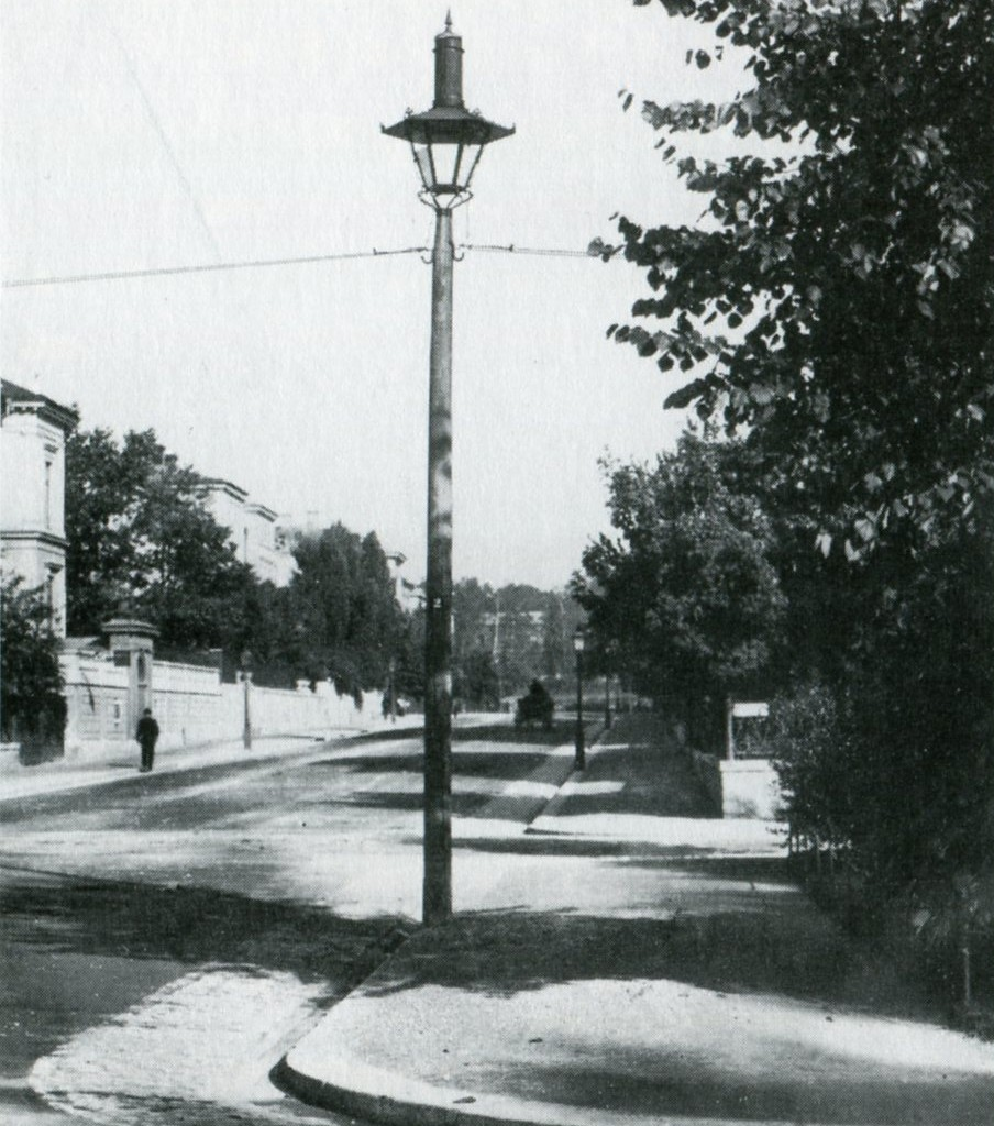 Den första elektriska bågljusbelysningen i Stockholm monterades på enkla trästolpar. Här Villagatan i Stockholm 1883. Strömmen till stolpen kom från en ångdriven dynamomaskin, generatorns föregångare.